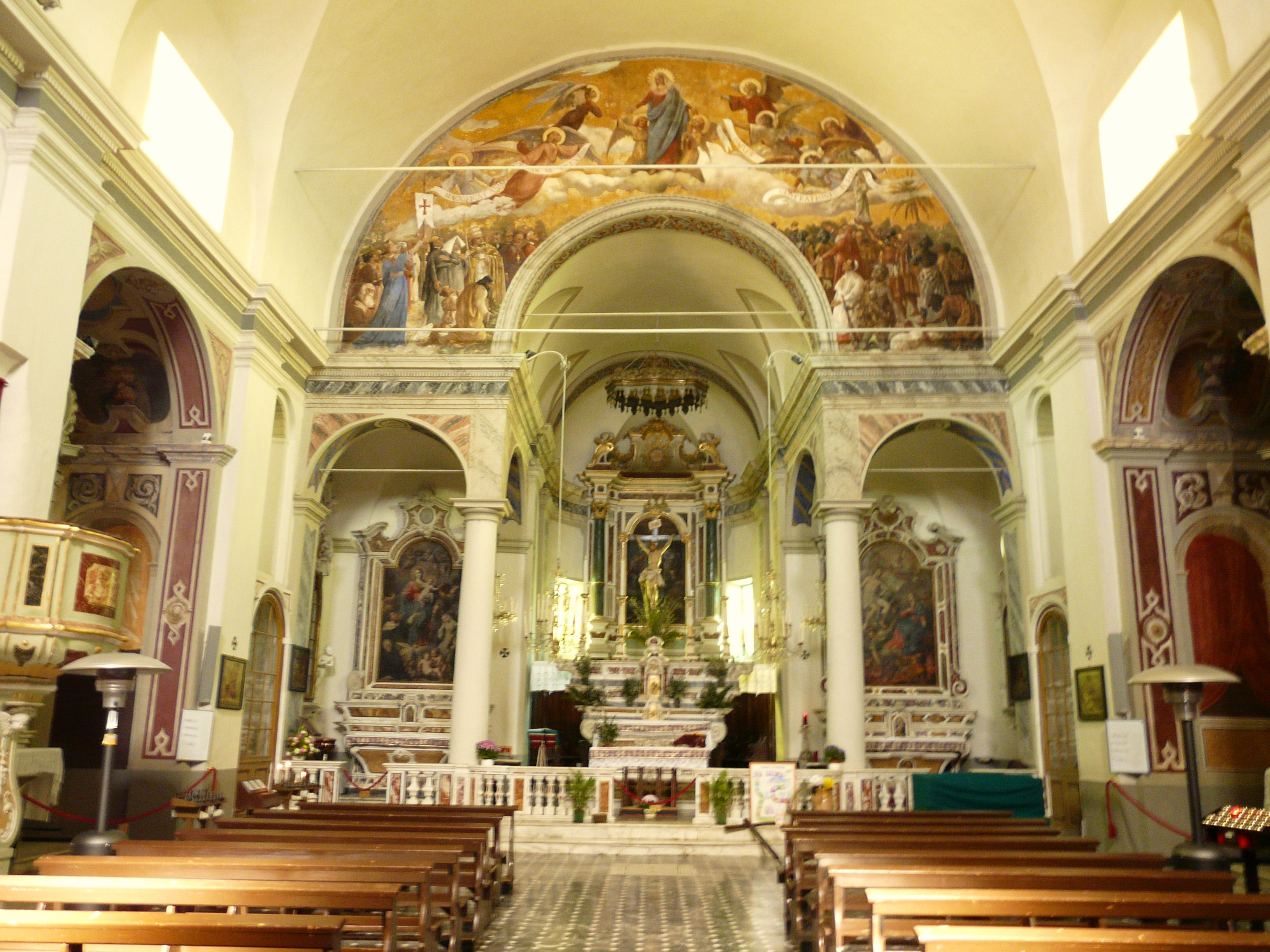 Chiesa della Visitazione, Cipressa, Liguria, Italia